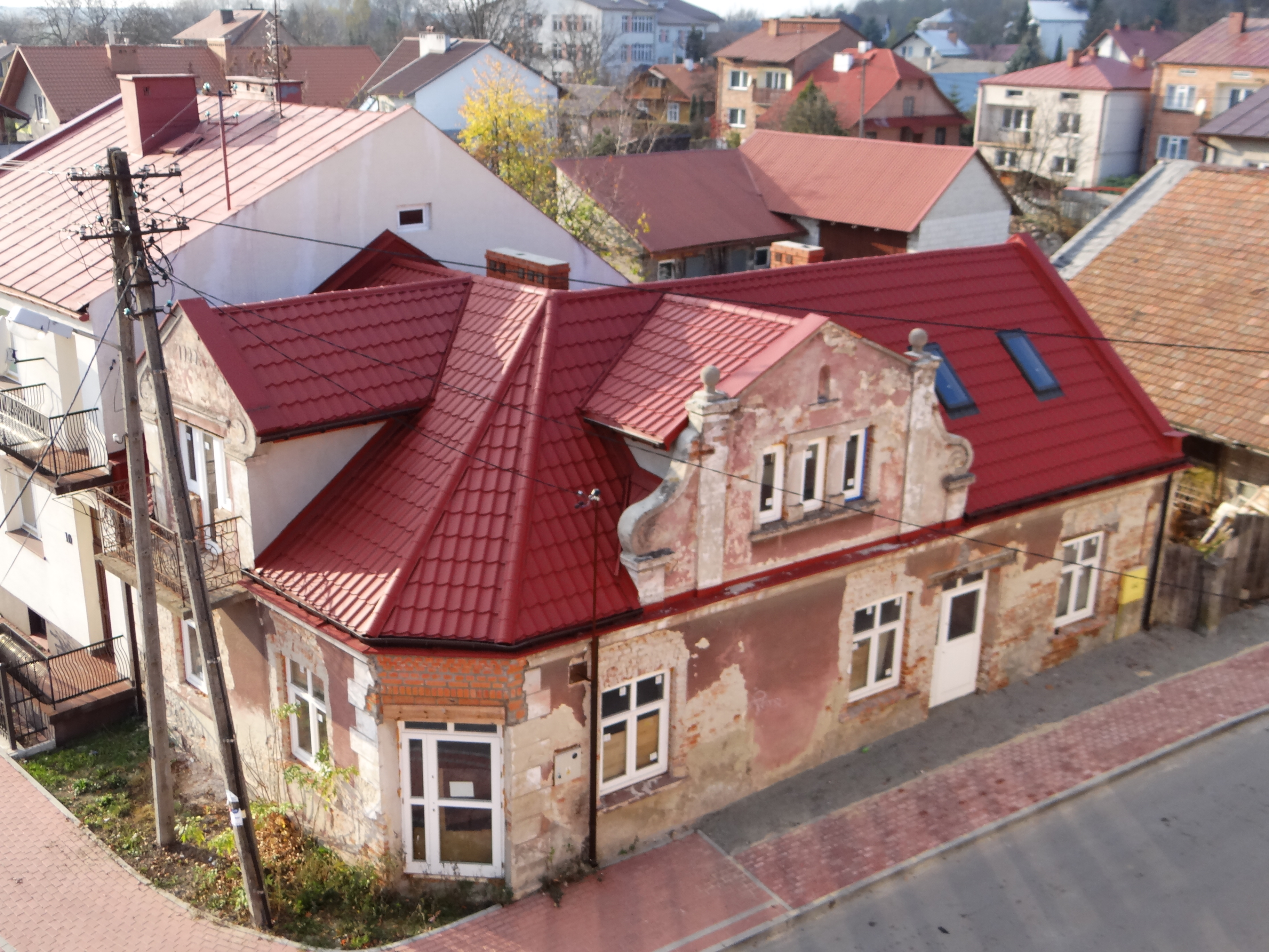 Zabytkowy budynek przy ulicy Wesoła 1